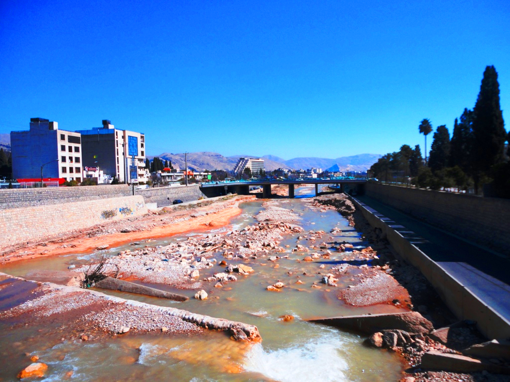 رودخانه خشک و هتل هما